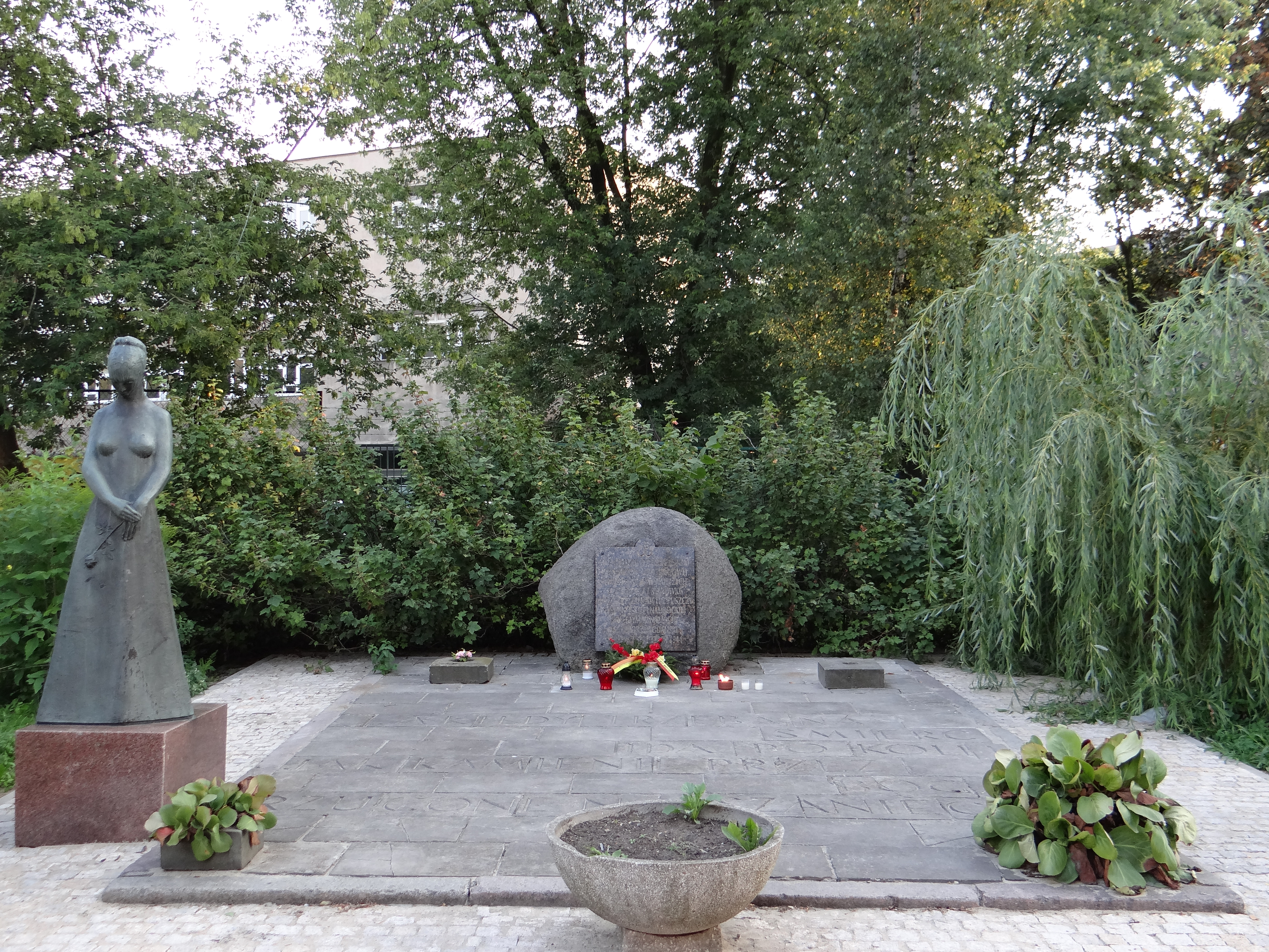 Miejsce upamiętniające partyzantów z lasów Kampinowskich i Nalibockich oraz powstańców warszawskich z Żoliborza i Starówki poległych w walce o Dworzec Gdański